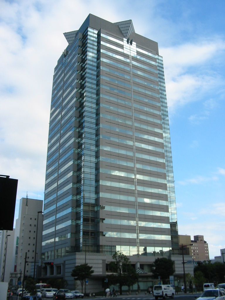 2007年9月8日撮影。国道45号線花京院交差点より撮影。